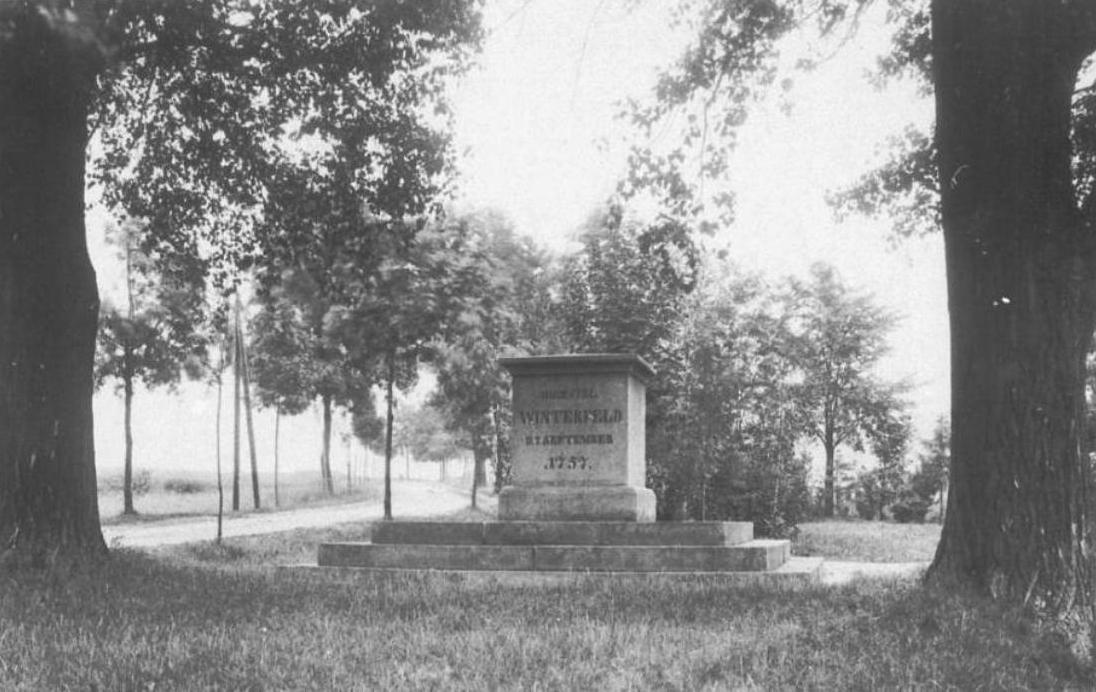 Winterfeldtdenkmal im ehemaligen Görlitzer Stadtteil Moys (heute: Zgorzelec Ujazd)